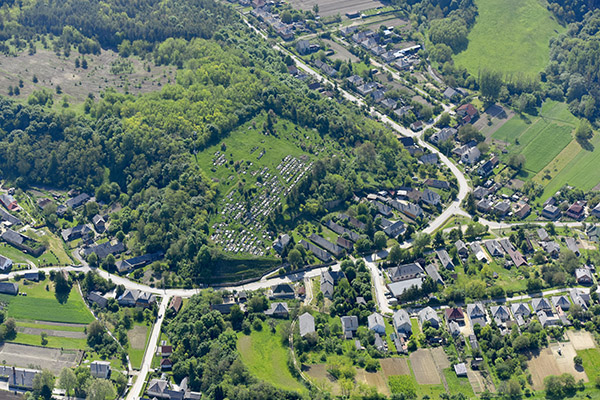 Jásd légi felvételen